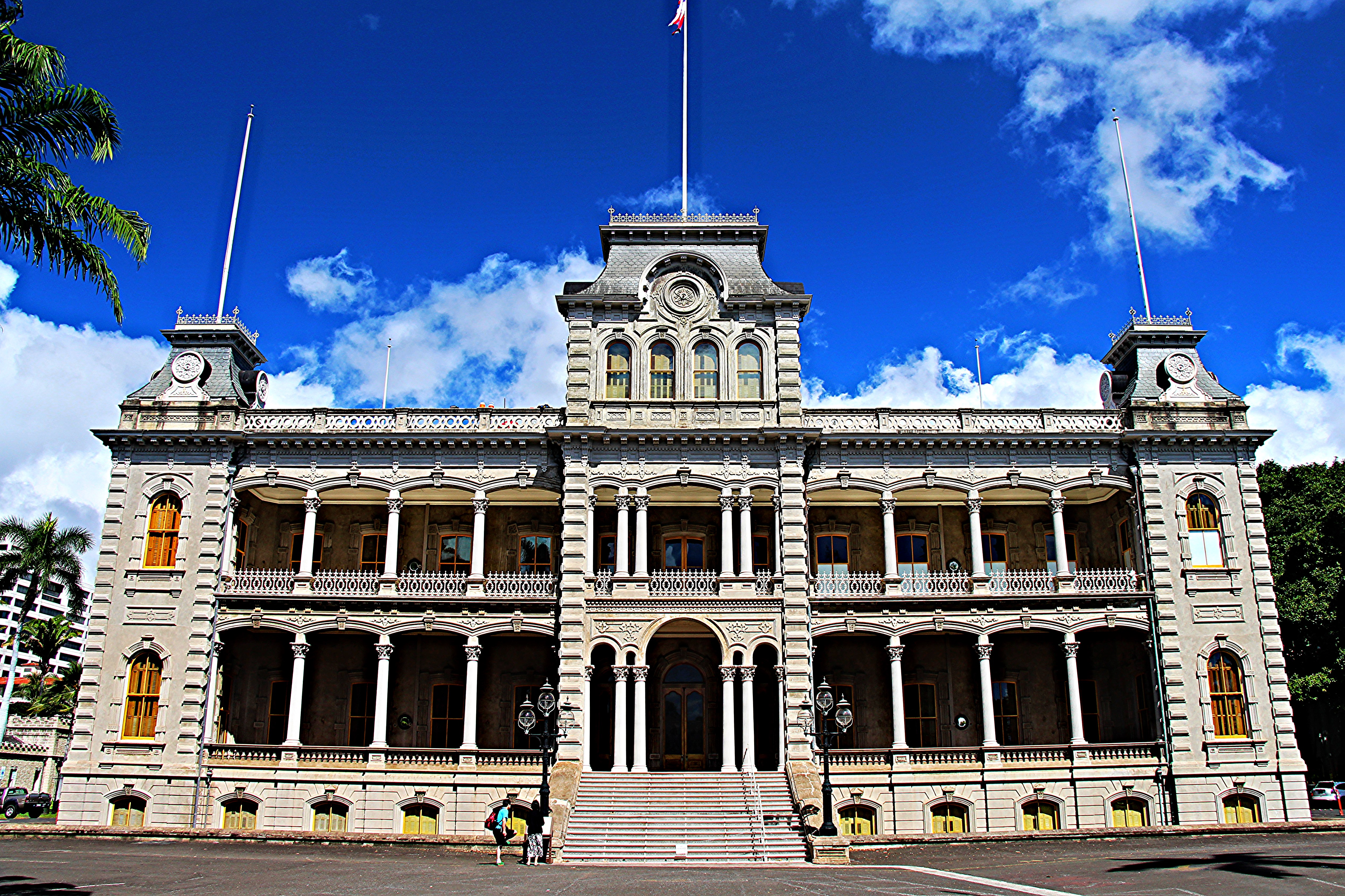 Hawaii 2014 153